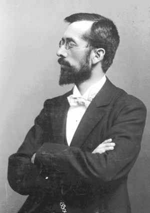 Ludwig Eid, pfalz-bayerischer Historiker, Speyer